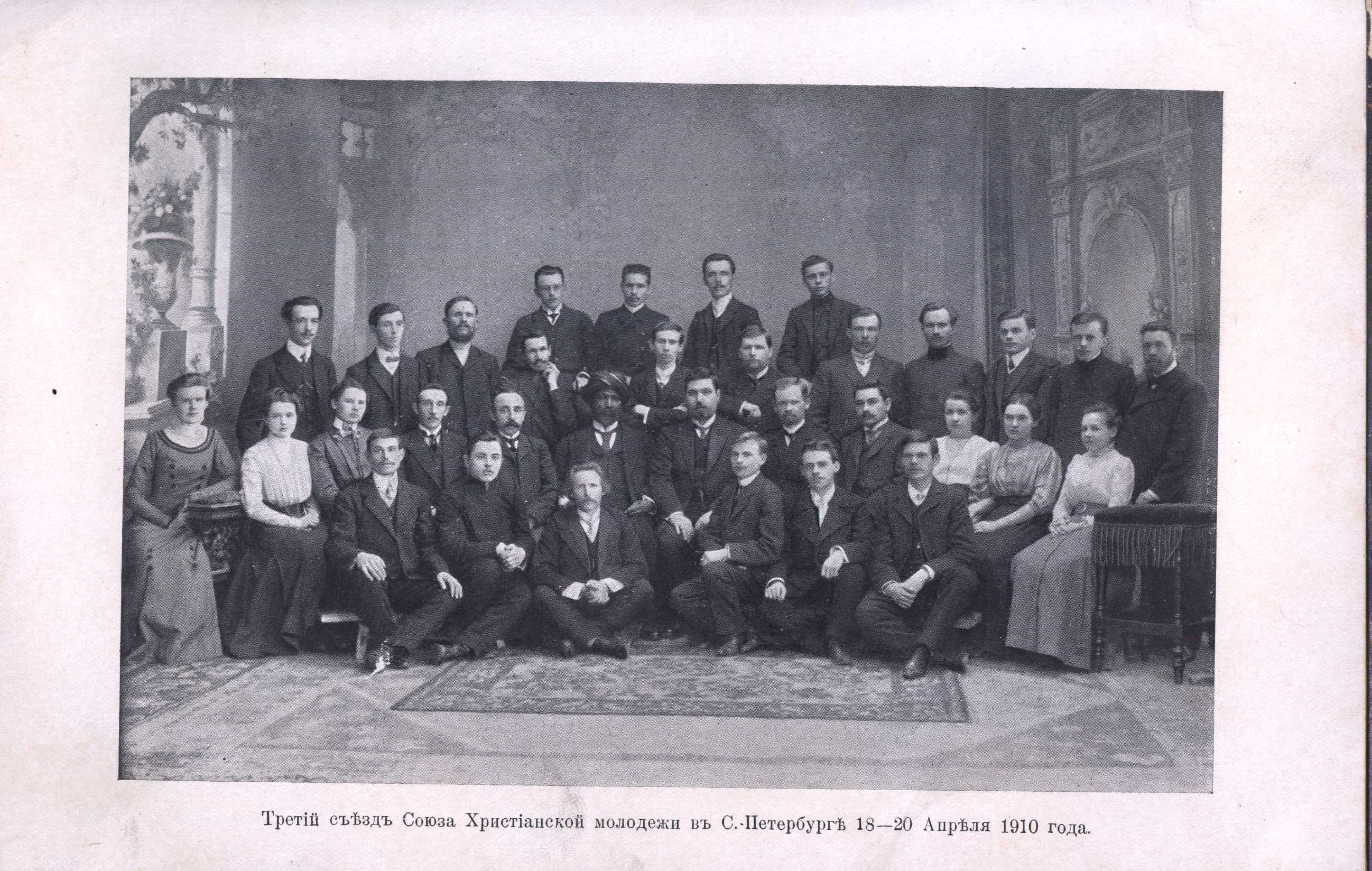 Третий съезд Союза христианской молодежи в Санкт-Петербурге, 1910 год. В центре И. С. Проханов.